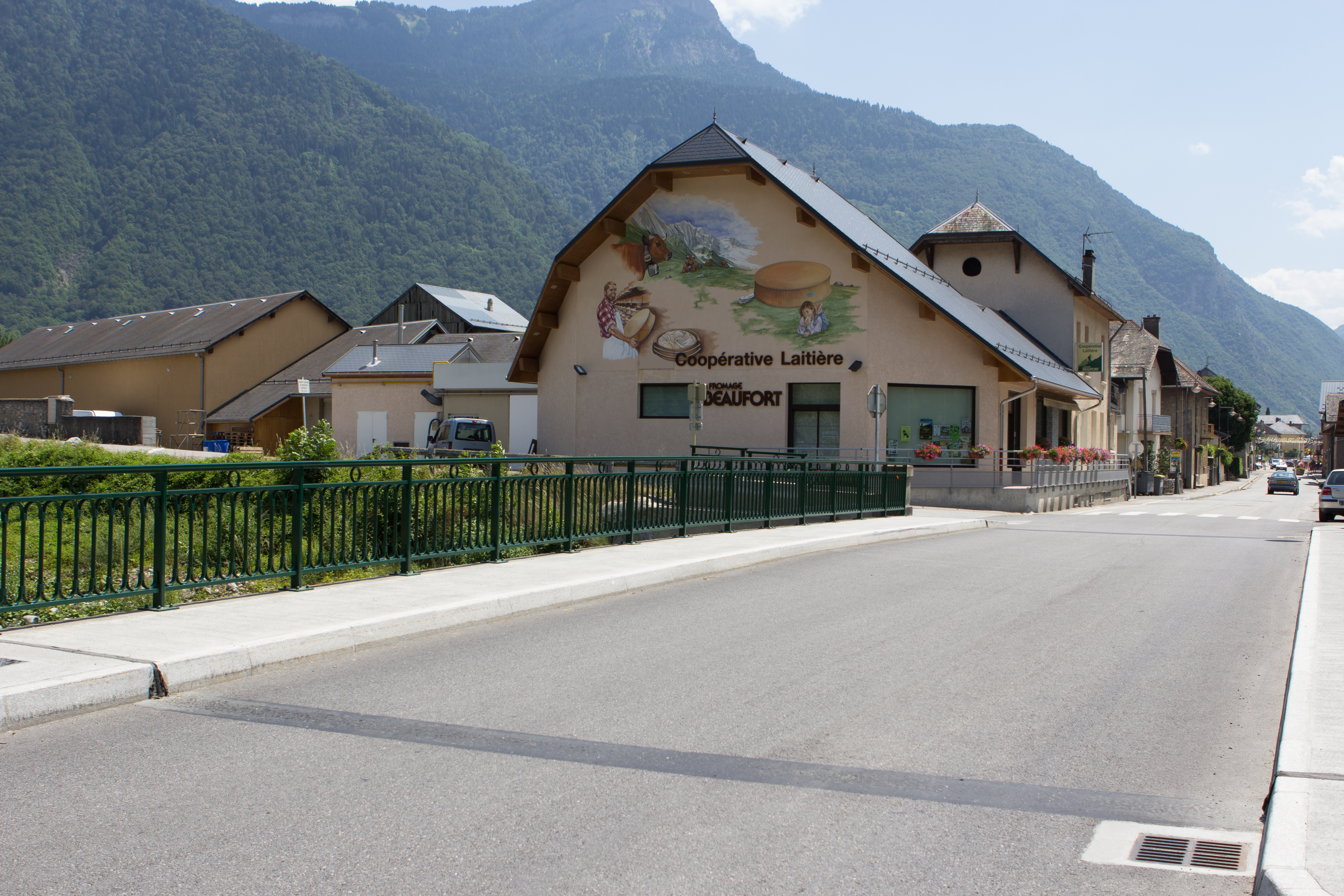 Vue de La Chambre / La Chambre / Savoie / France